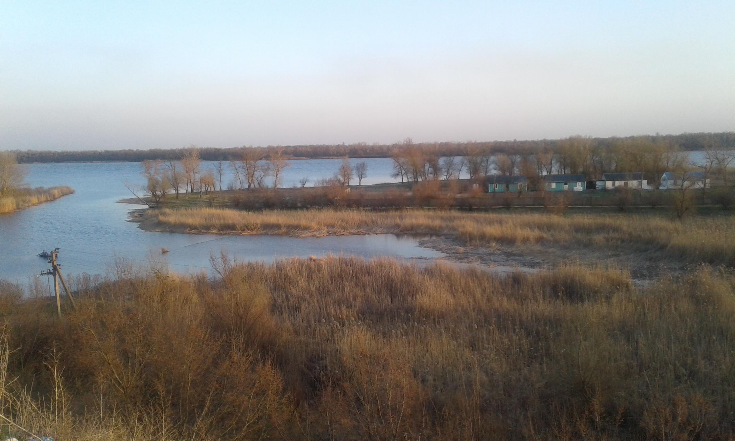 Вид на затоку и остров